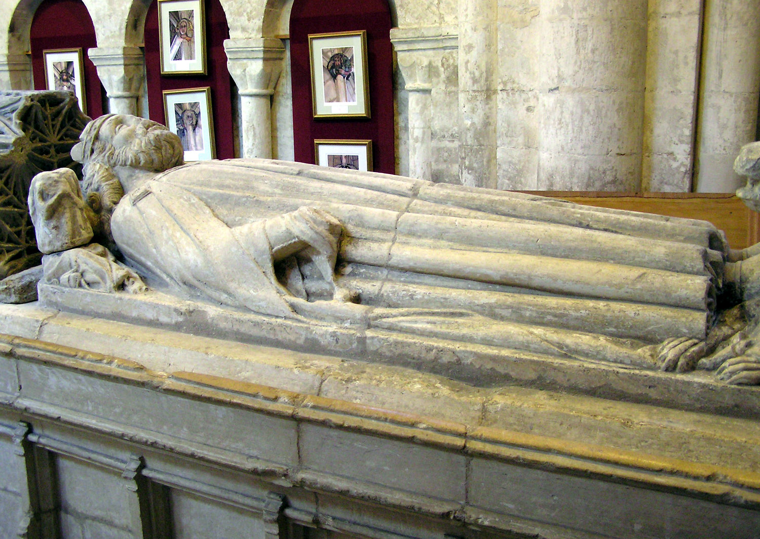 Tumba del rey Athelstan The tomb of King Athelstan in Malmesbury Abbey, Malmesbury, England. There is nothing in the tomb beneath the statue, the relics of the king having been lost in the Dissolution of the Monasteries in 1539. Perhaps the remains were destroyed by the Kings Commissioners or they were hidden before the Commissioners arrived to close down the Abbey. Taken by Adrian Pingstone in February 2005 and released to the public domain.